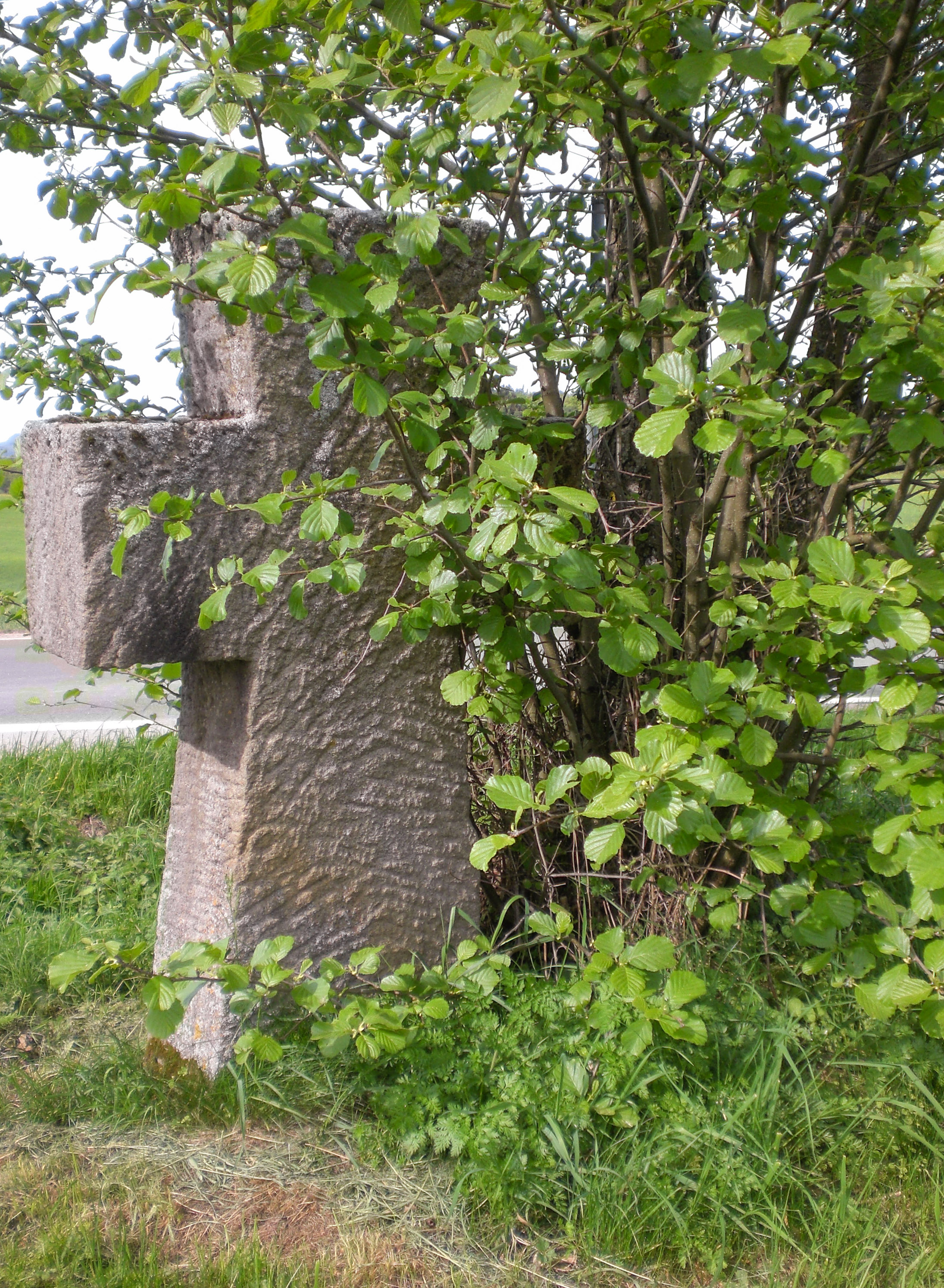 Steinkreuz, Engelthal am Sportplatz, Sicht von hinten